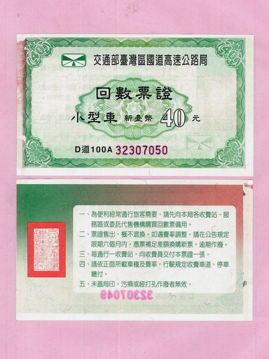 中華民國交通部臺灣區國道高速公路局小型車回數票正面及反面。